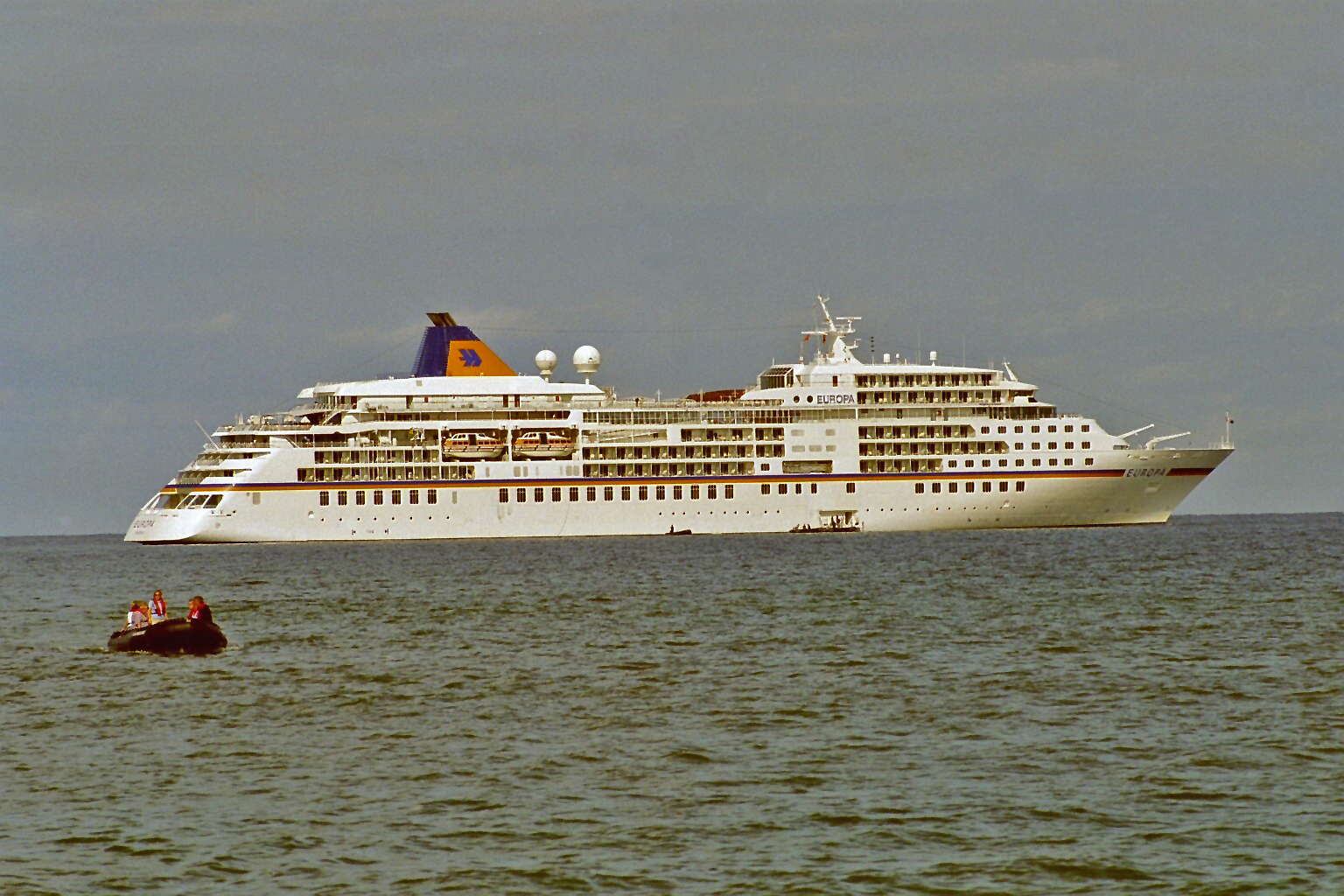 Die MS Europa der HApag Lloyd vor der Sylter Westküste beim Ausbooten